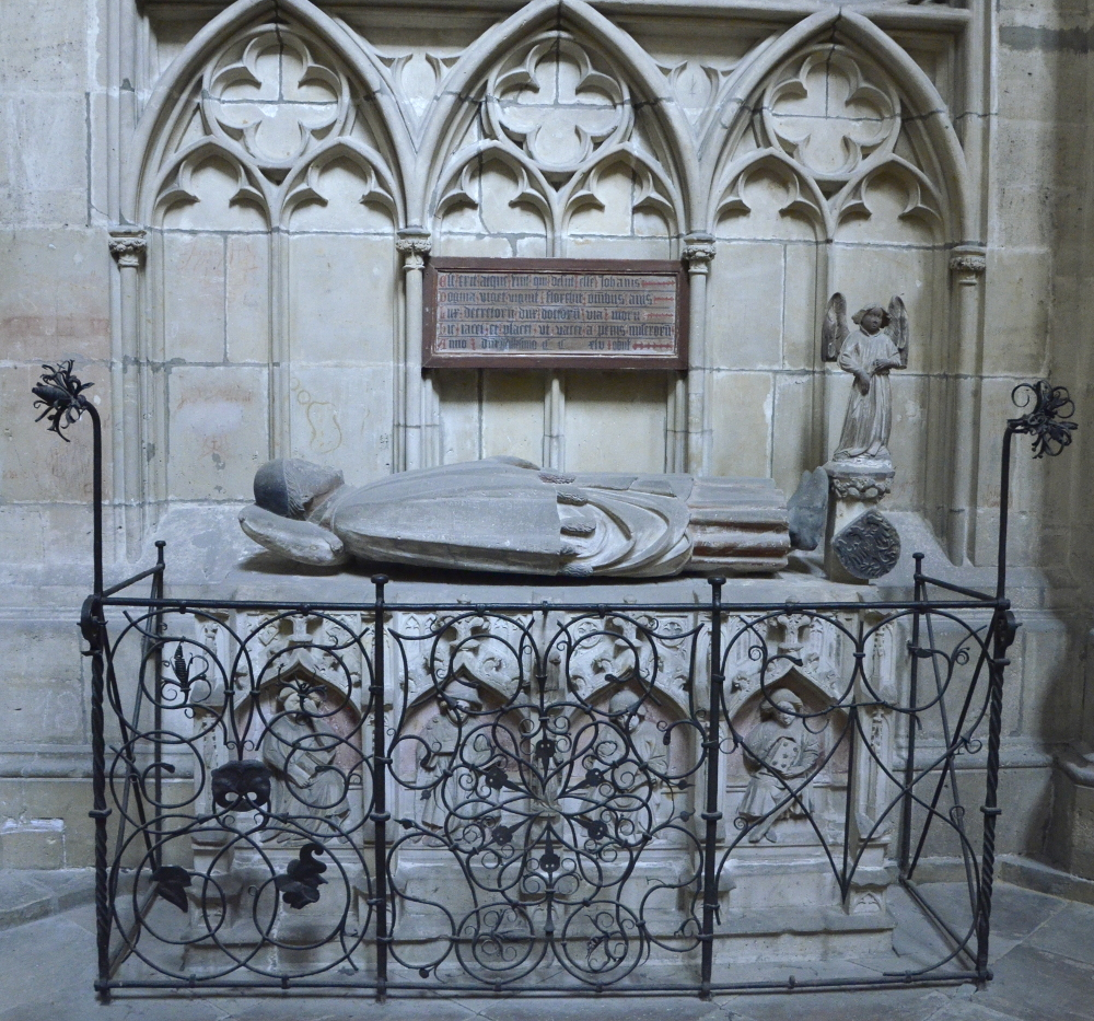 Grabdenkmal für den Dompropst Johannes Zemeke († 1245) im westlichsten Joch des südlichen Chorumgangs